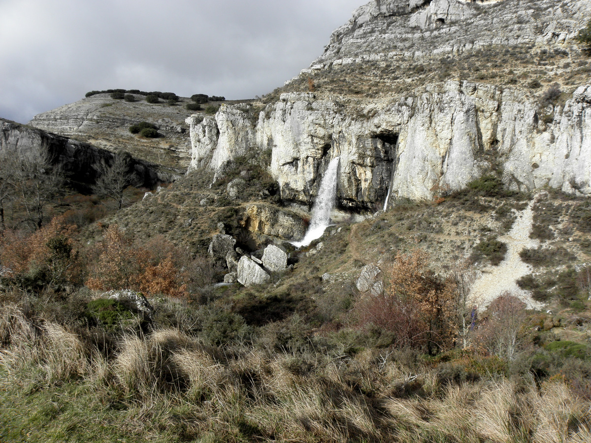 Surgencia 'La Yeguamea' en el término de Fuentedra, Burgos, España. Vista general. Vierte al río Odra.